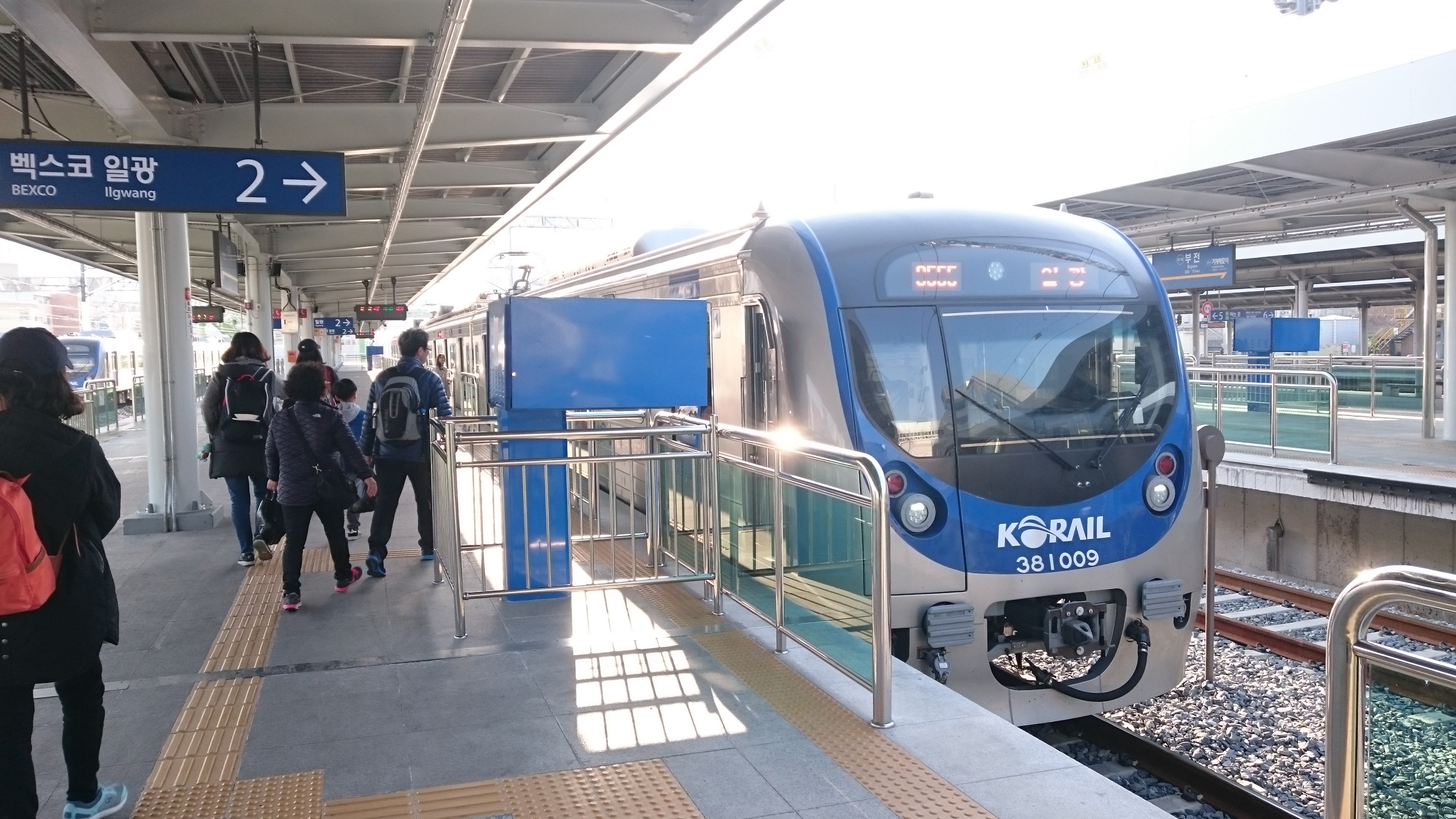 韓国鉄道公社381000型(釜田駅にて)。